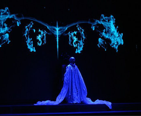 بر فرس تندرو (محسن معینی)